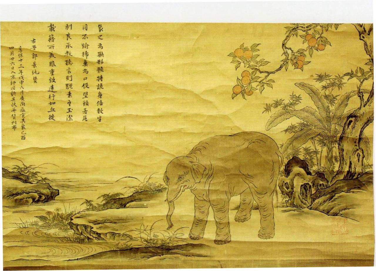 享保13年に広南より献上された象が享保14年4月26日に入京したとの説明が付されている。